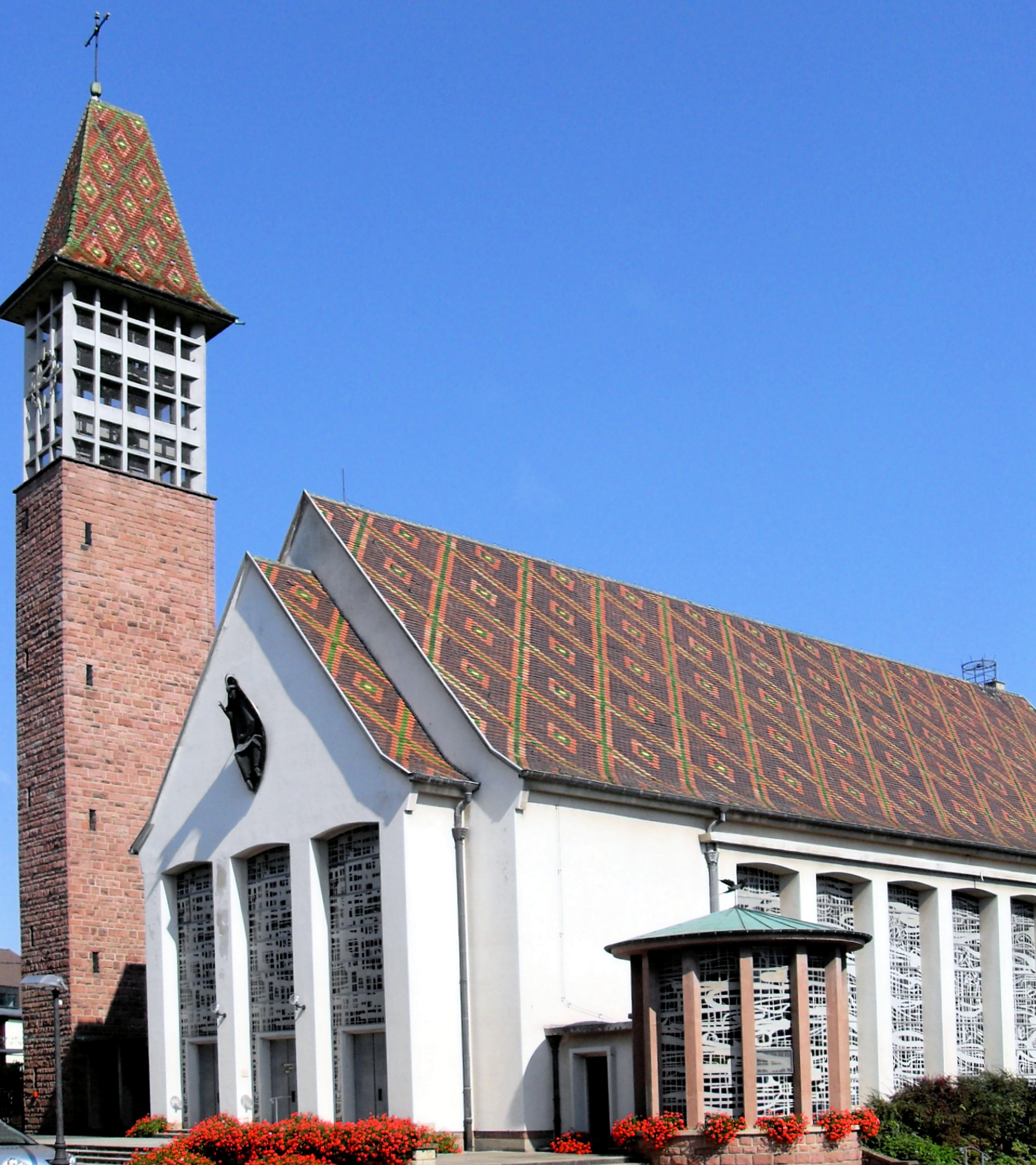 L'église Saint-Pierre-et-Saint-Paul à Bennwihr